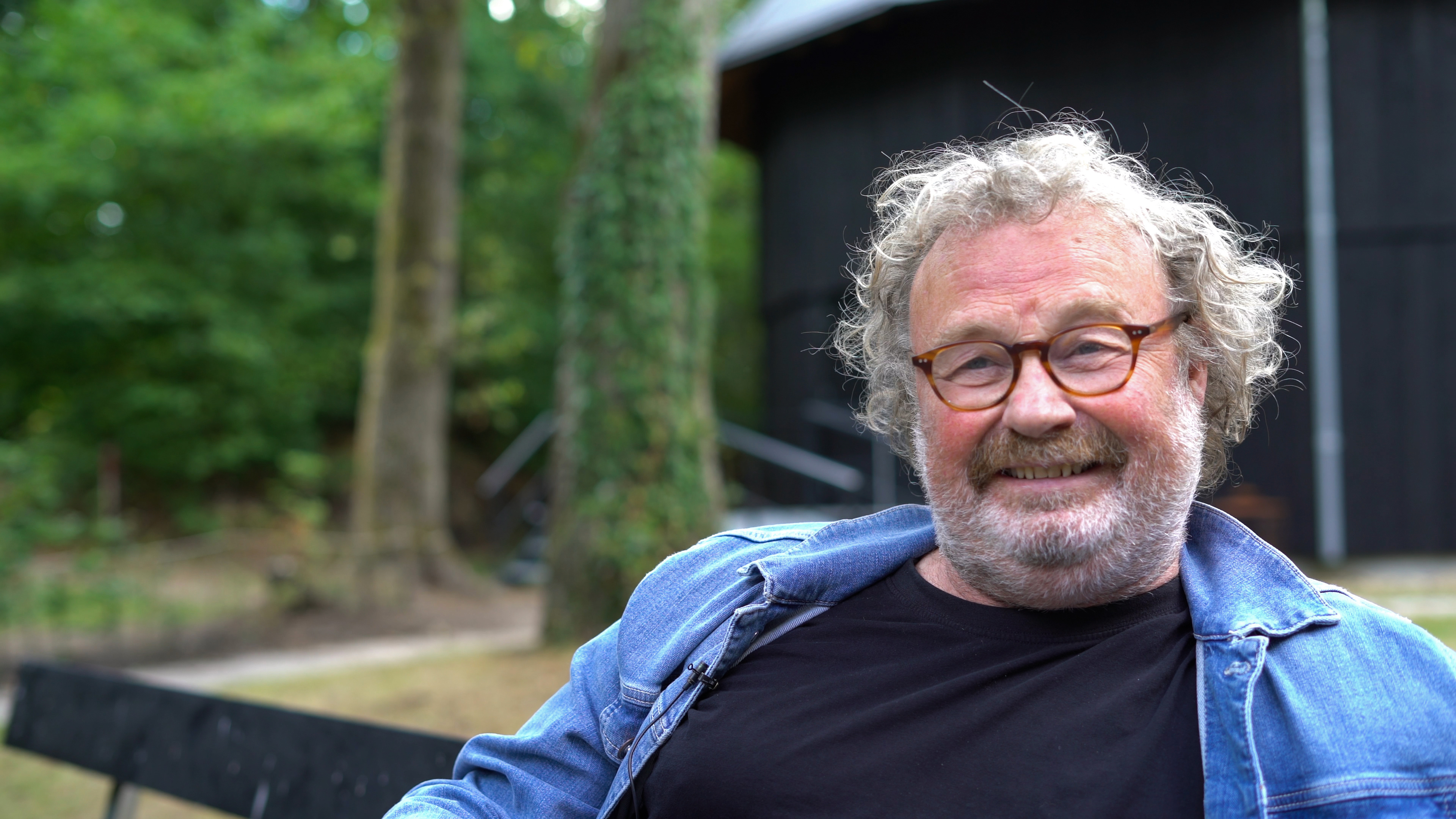 Jack Nieborg